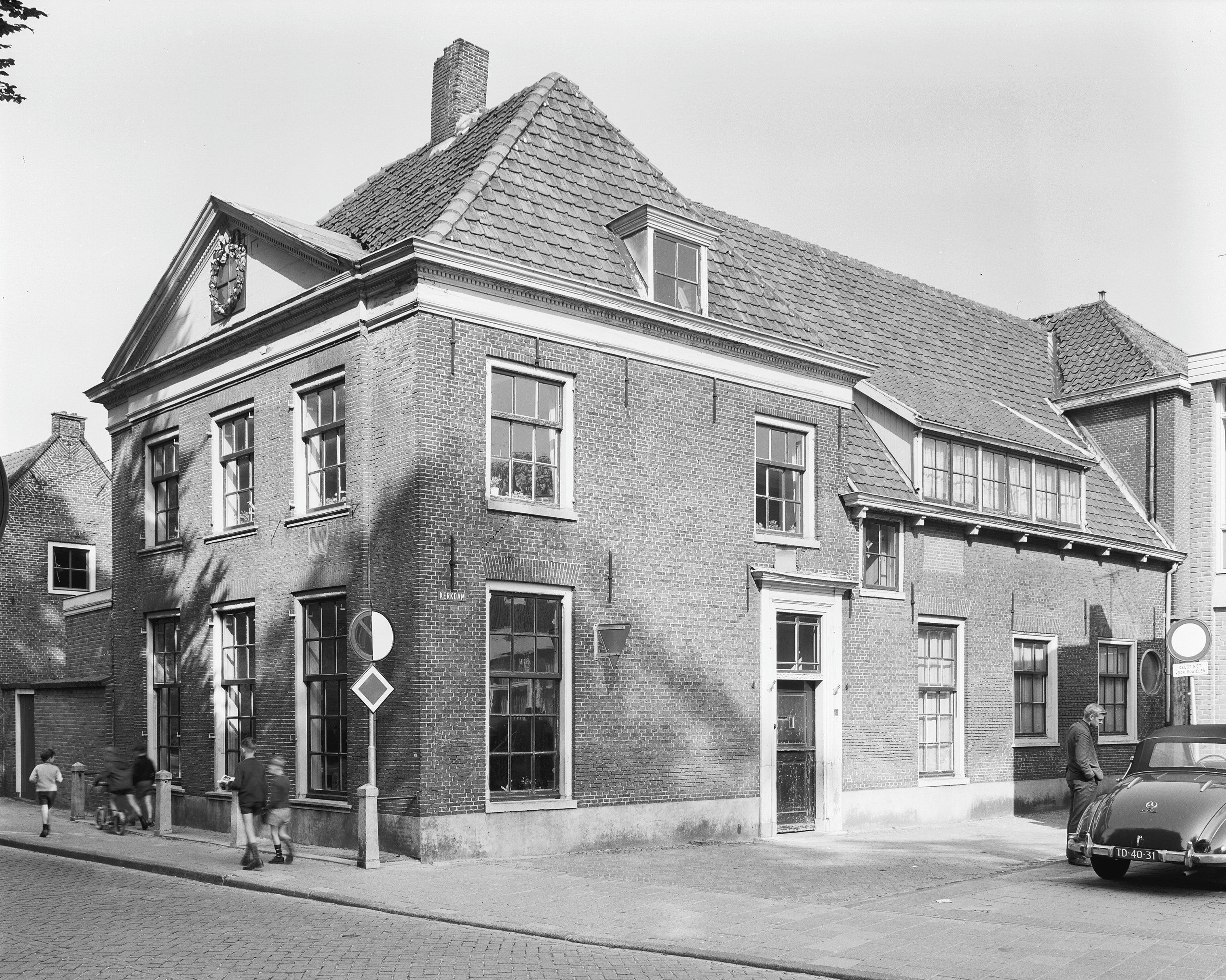 De Burcht, gevels